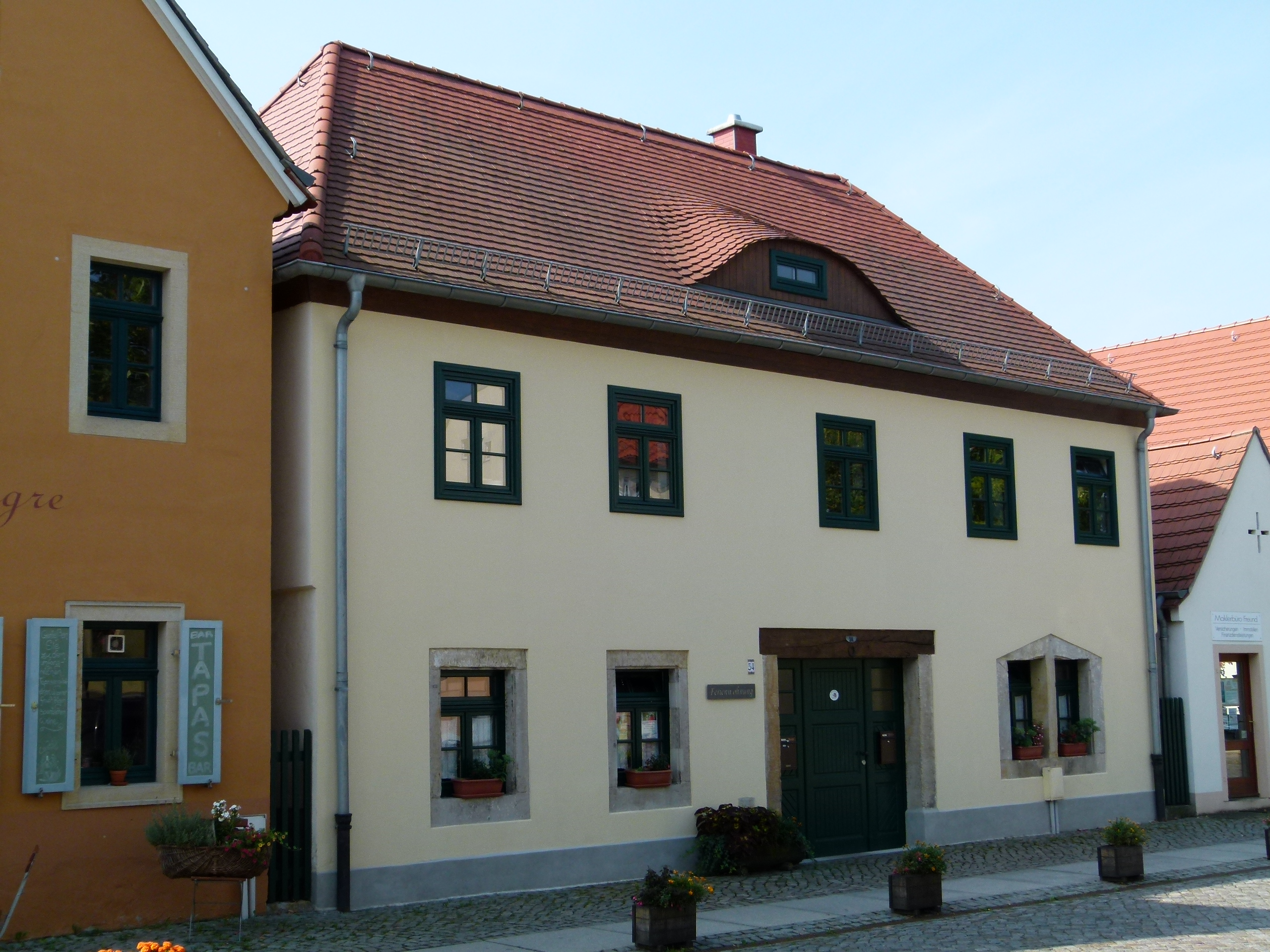 Denkmalgeschütztes Haus, Altkötzschenbroda 54, Radebeul, Sachsen